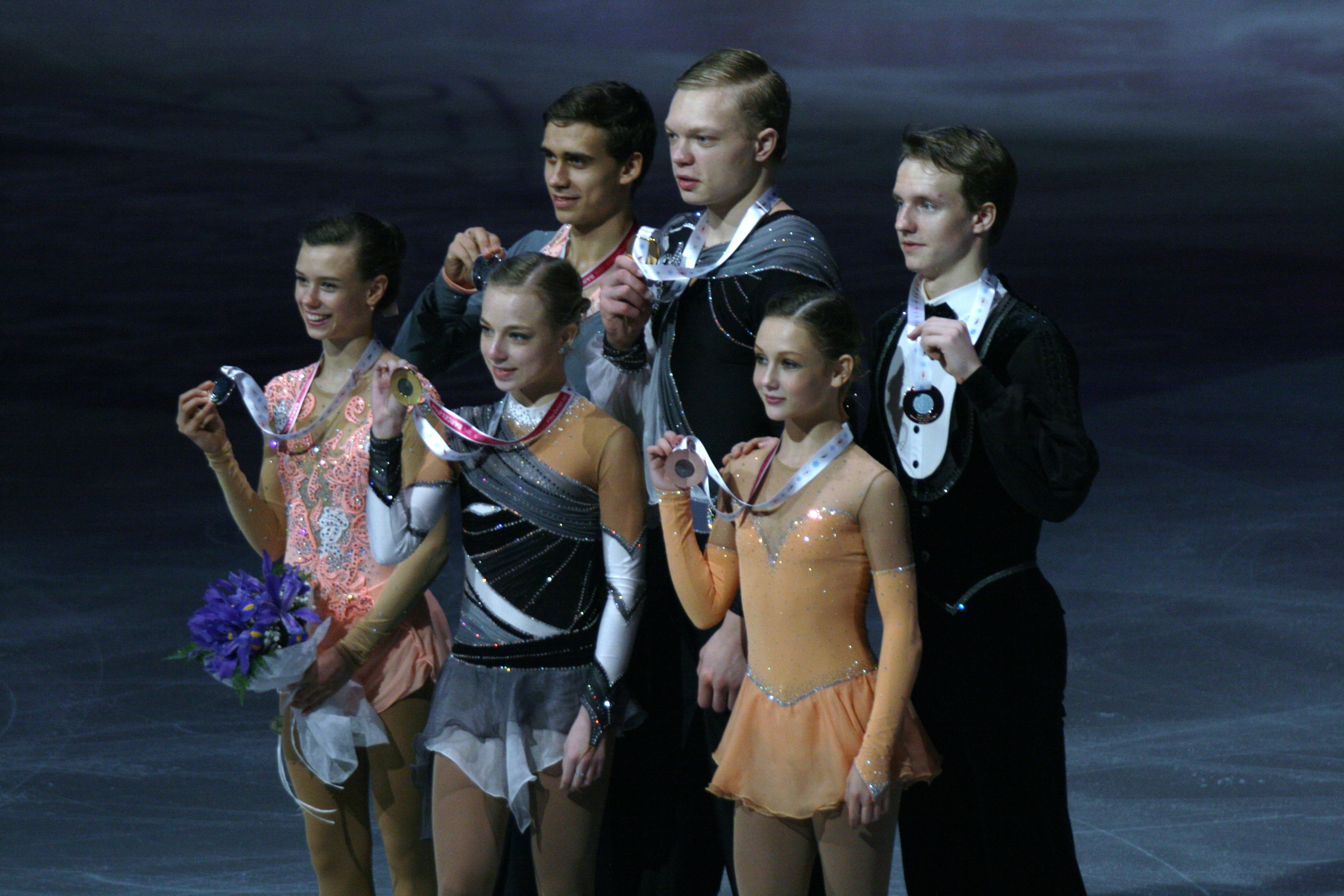 Церемония награждения победителей и призёров в парном катании на на финале Гран-при по фигурному катанию среди юниоров 2015-2016. Слева на право: Анна Душкова и Мартин Бидар (Чехия) - 2е место, Екатерина Борисова и Дмитрий Сопот (Россия) - 1е место, Амина Атаханова и Илья Спиридонов (Россия) - 3е место.